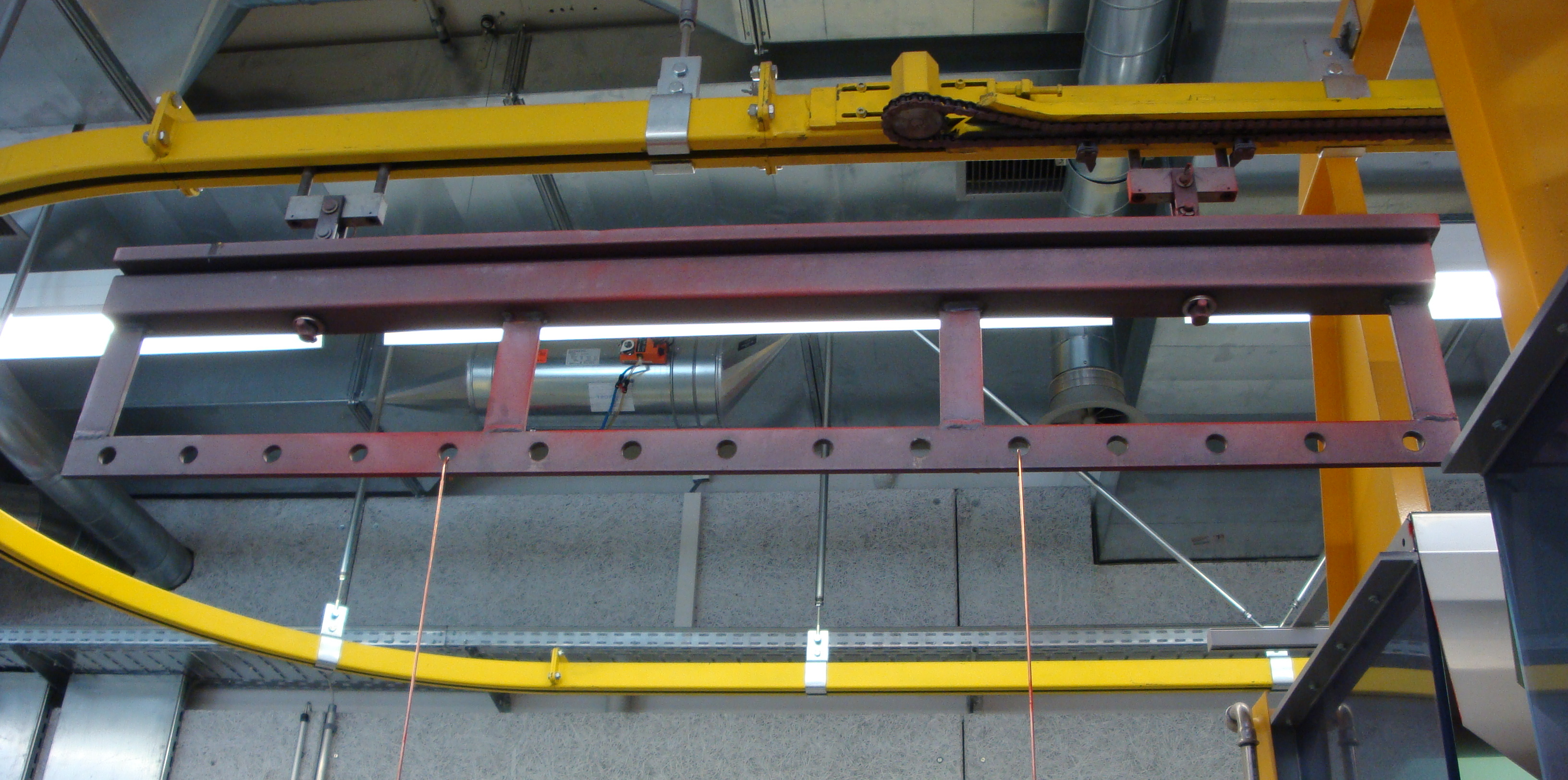 Werkstückaufhängung für die Lackierung in Lackierkabinen